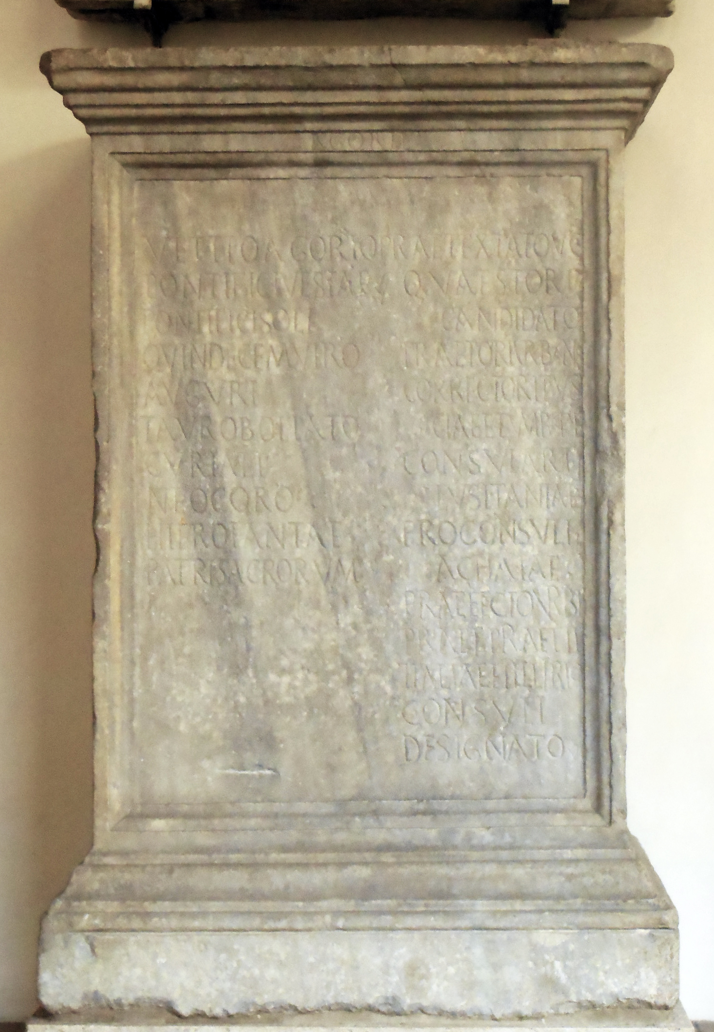 Roma, Museo nazionale romano a palazzo Altemps, basamento con iscrizione di dedica a Vettio Agorio Pretestato (320-384 ca.)